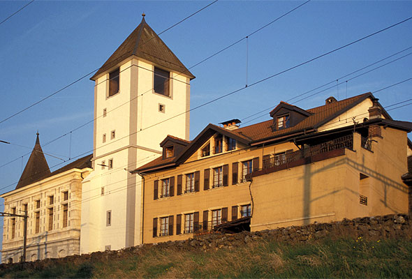 Neues Rathaus von Grandson